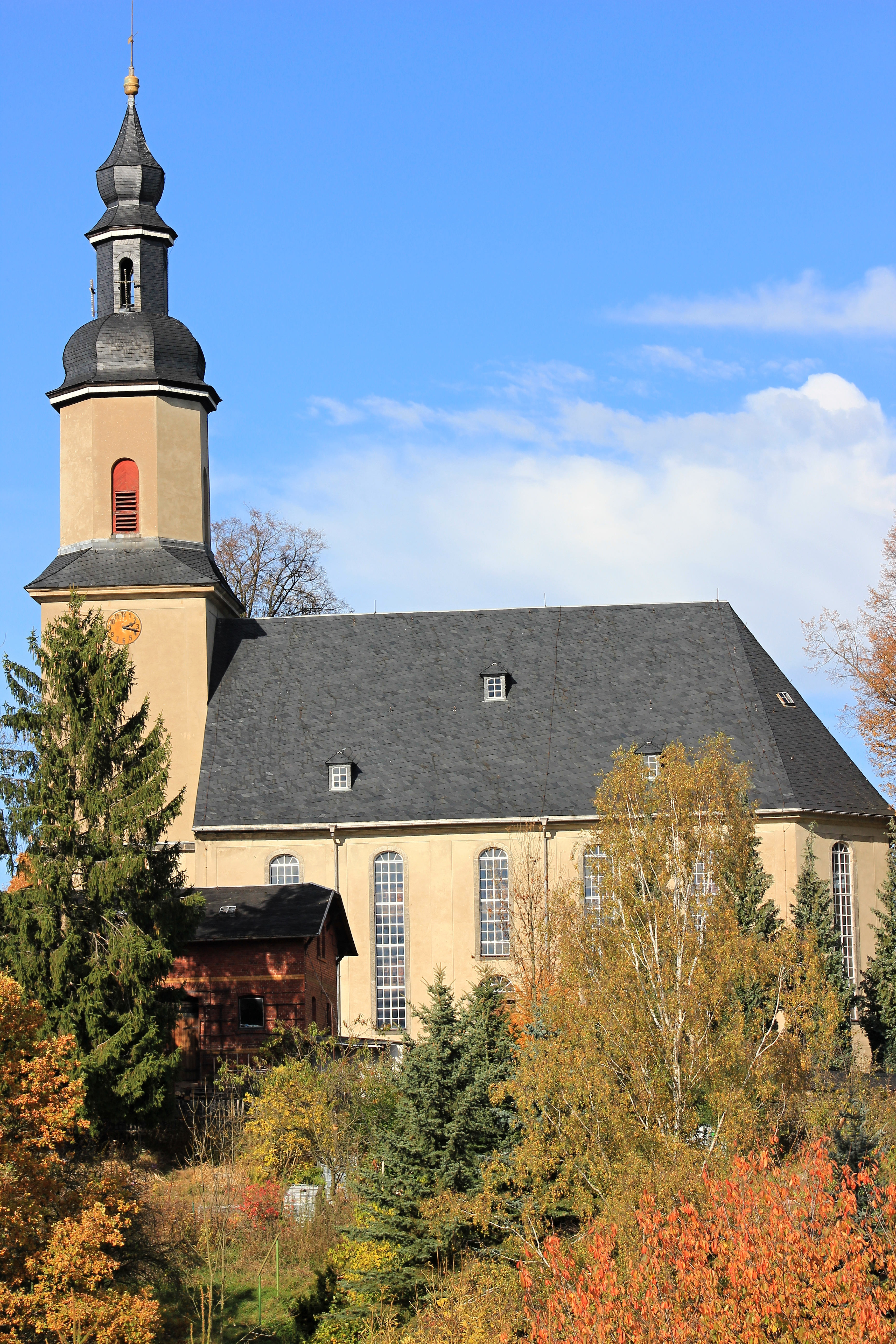 Kirche in Wildbach. Ortsteil Bad Schlema. Sachsen.